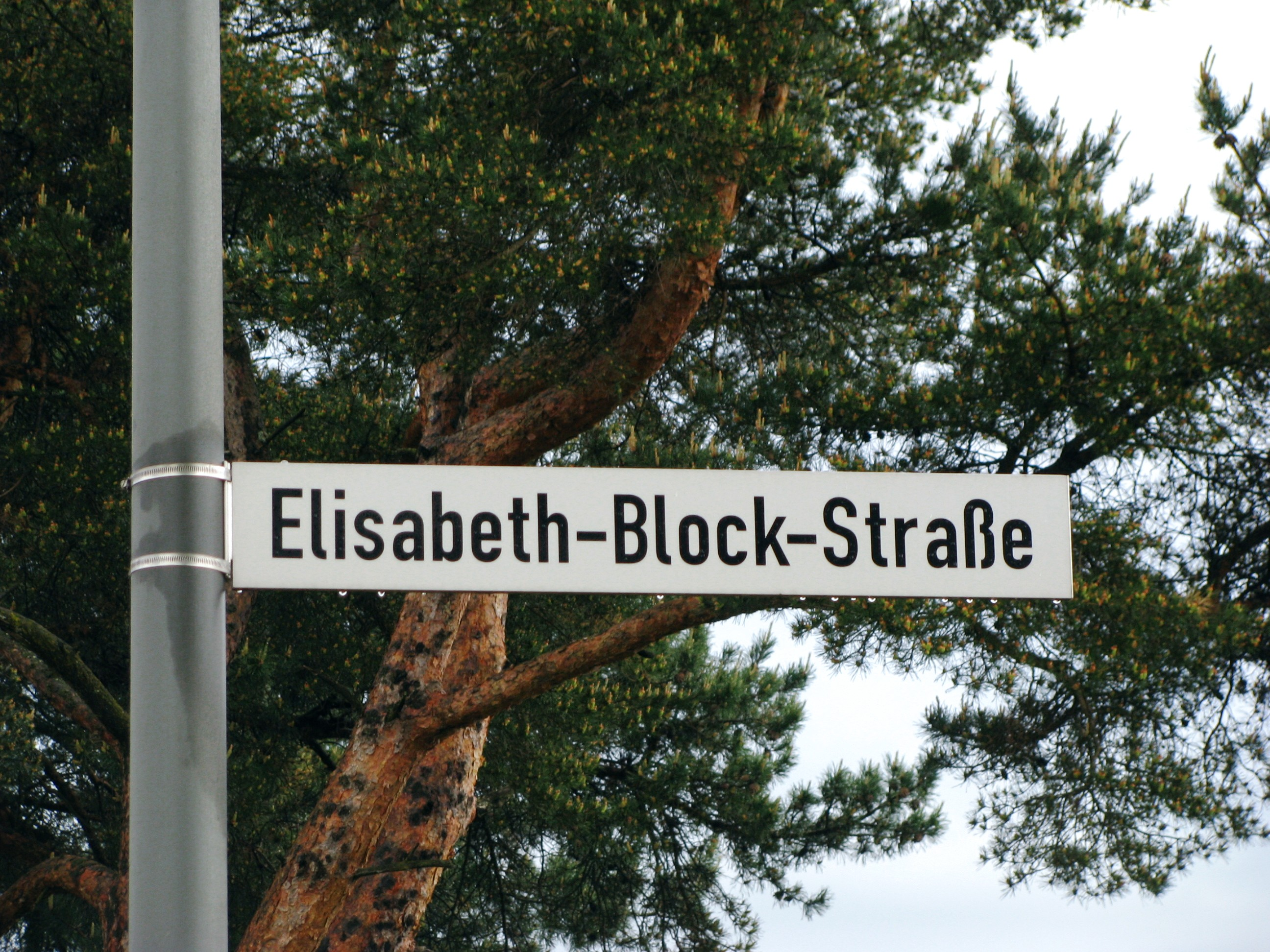 Schild der Elisabeth-Block-Straße in der Gemeinde Prutting